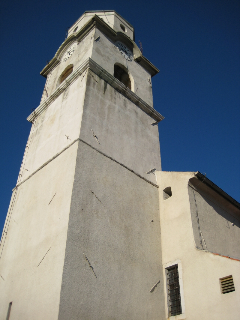 Crkva Svetog Petra i Pavla, Bribir, Croatia